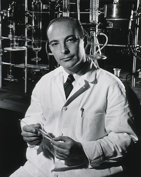 Arthur Kornberg